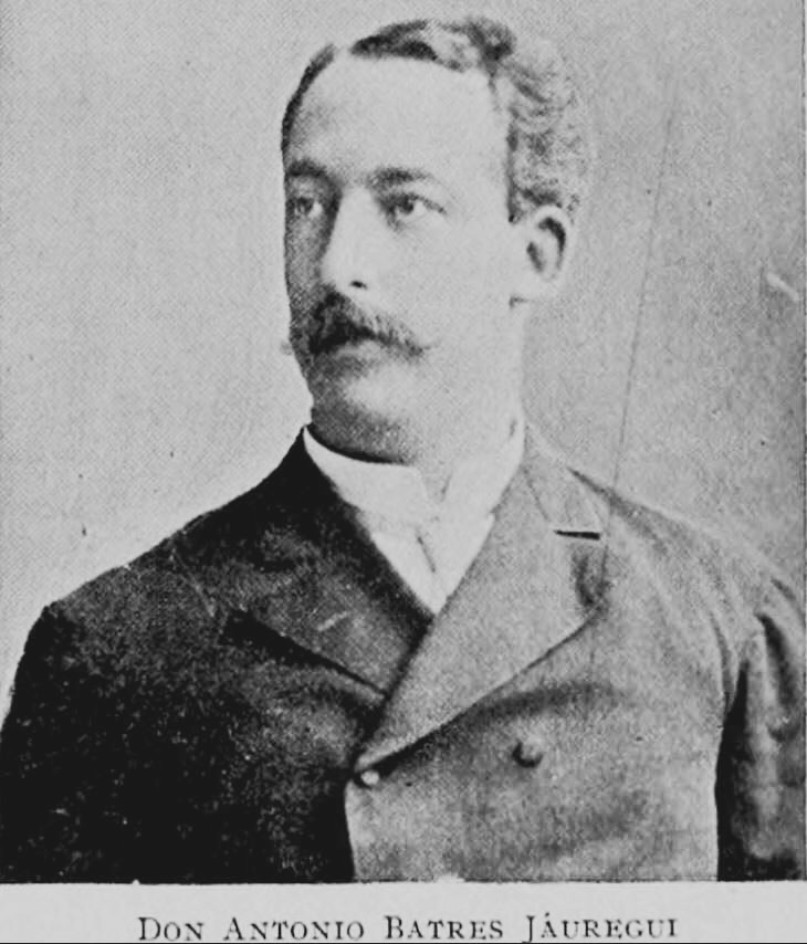 Licenciado Antonio Batres Jáuregui; eminente diplomático guatemalteco.